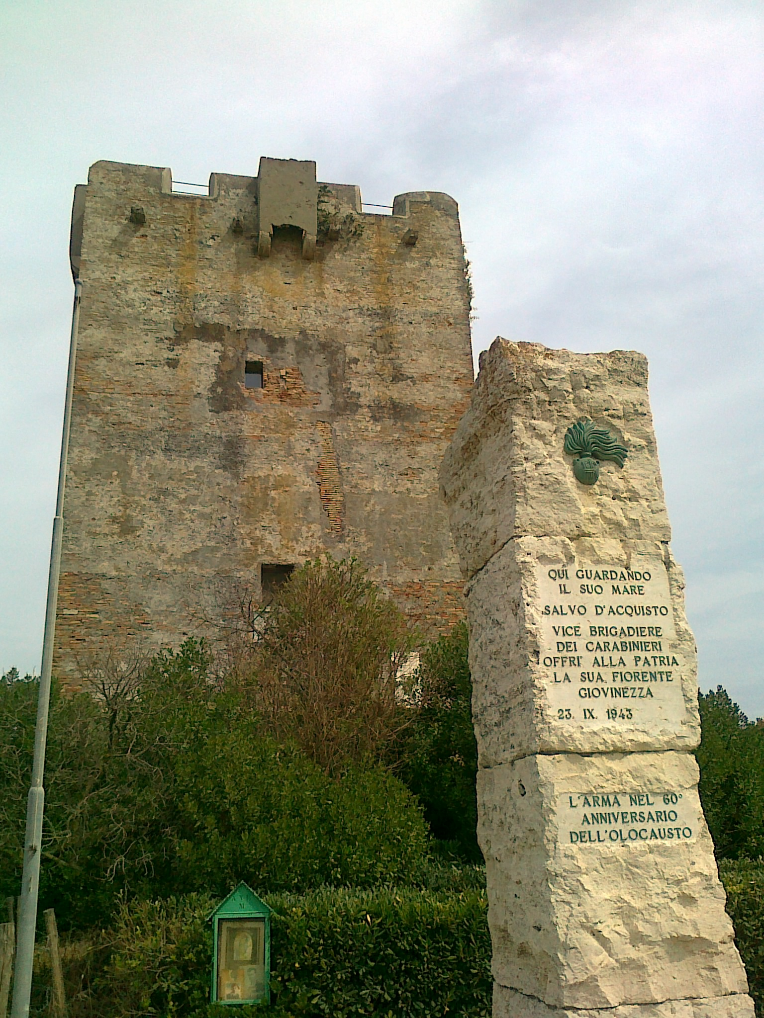 Torre di Palidoro. Luogo della Fucilazione di Salvo d'Acquisto. Lapide commemorativa.